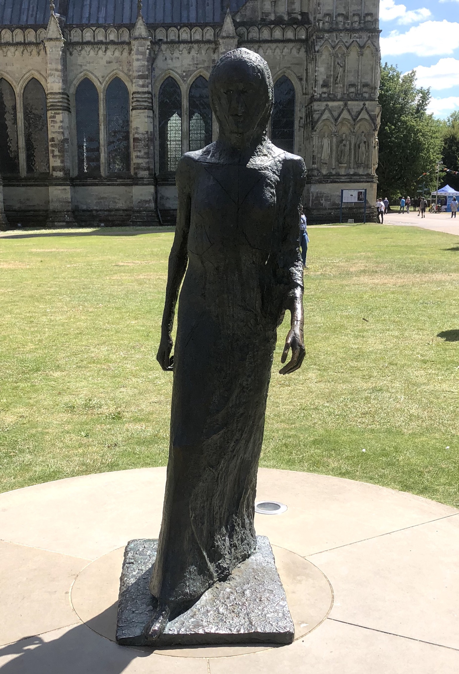 Skulptur vor der Kathedrale von Salisbury